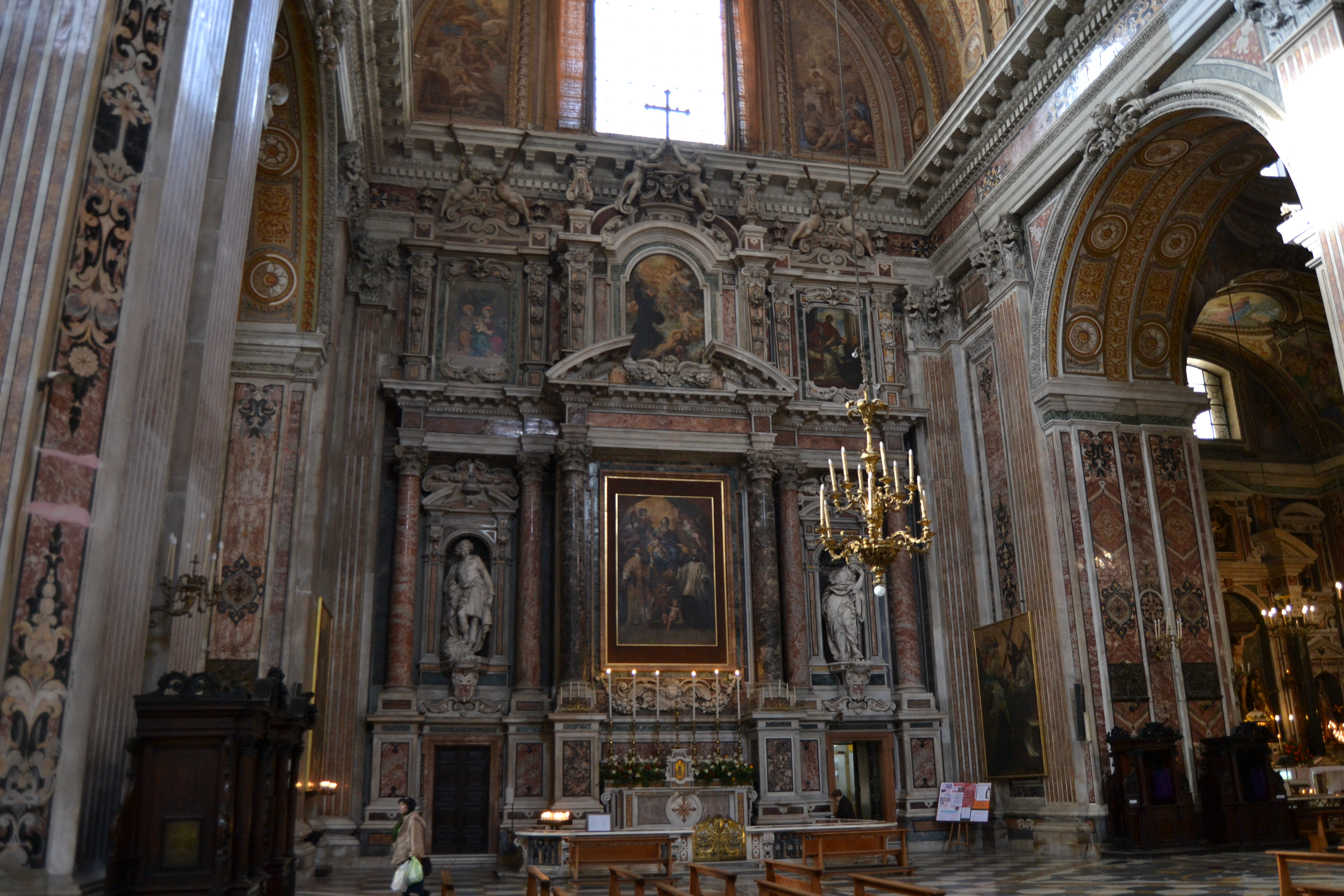 Chiesa del Gesù Nuovo (Napoli) - Transetto sinistro